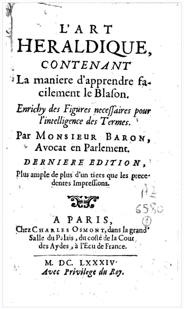 L'Art héraldique címlapja